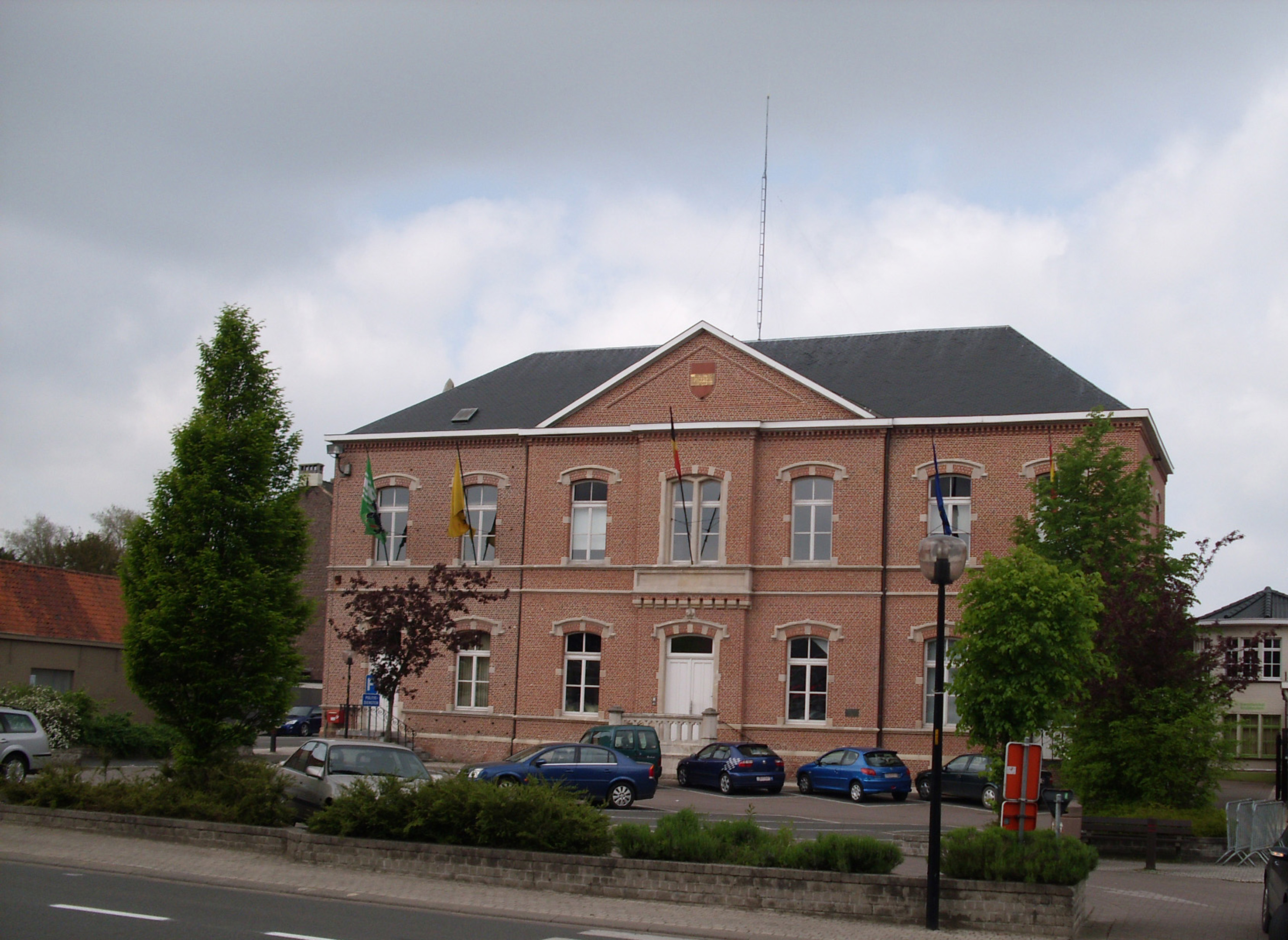 Gemeentehuis van Kruishoutem - Oost-Vlaanderen - Vlaanderen - België